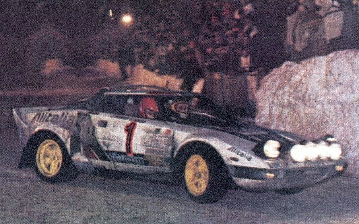 Sandro Munari en 1976 sur Lancia Stratos HF (col du Turini, rallye Monte Carlo), 'Super Auto 77', Panini figurina n°38.